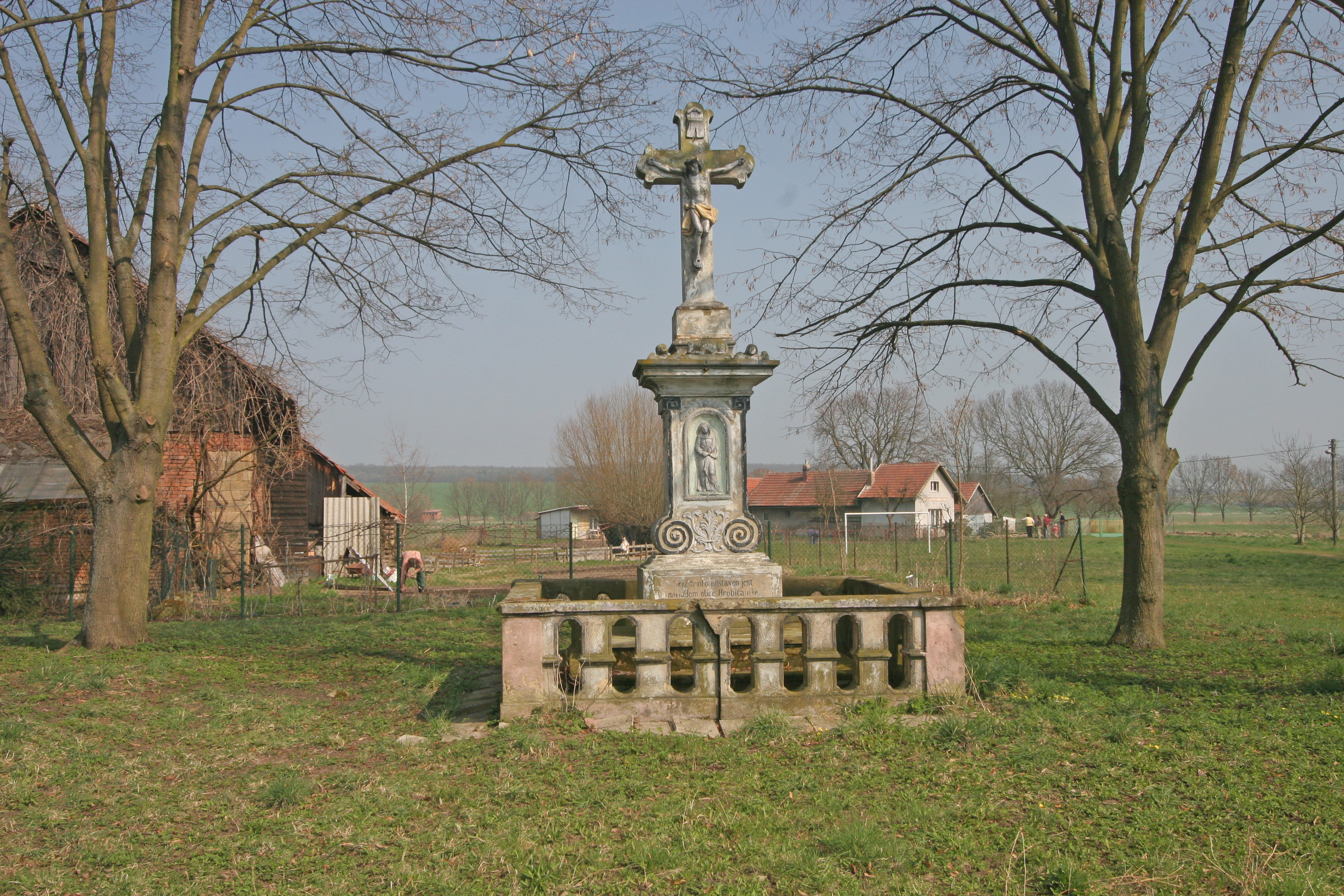 Sloup se sochou ukřižovaného Ježíše Krista s balustrádou, náves